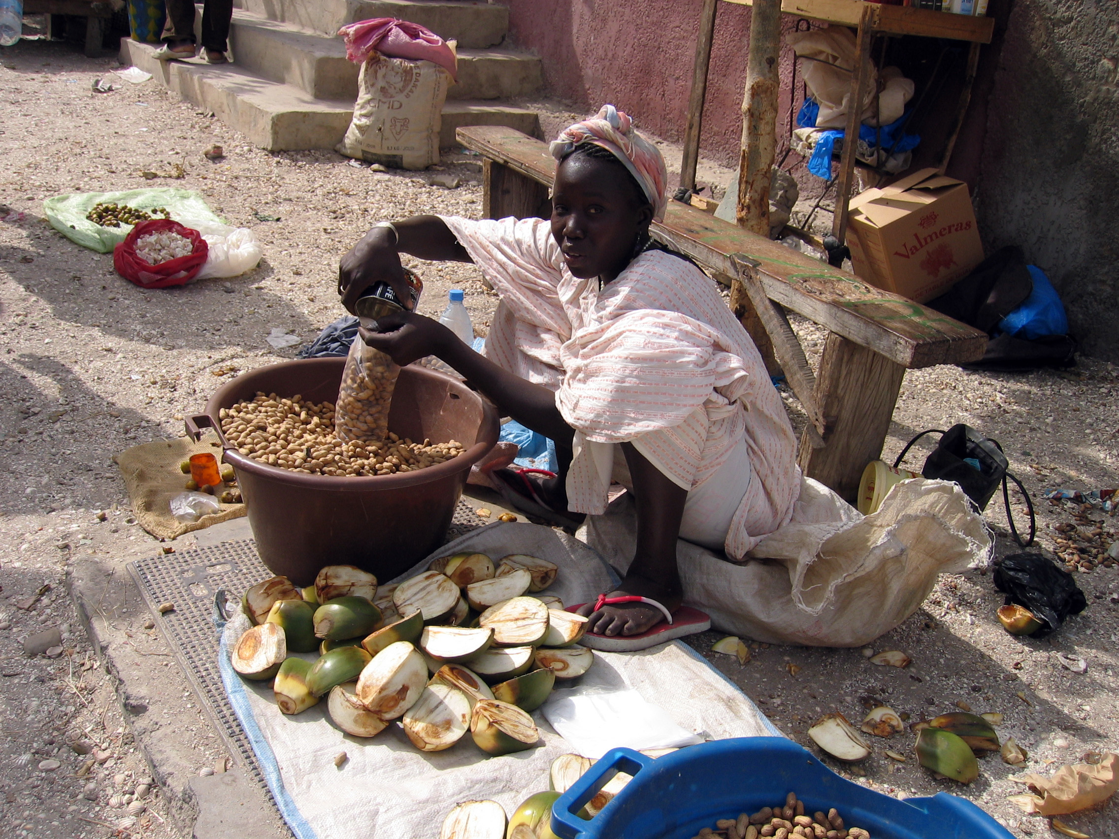 Ensachage d'arachides dans une rue de Joal-Fadiouth (Sénégal)